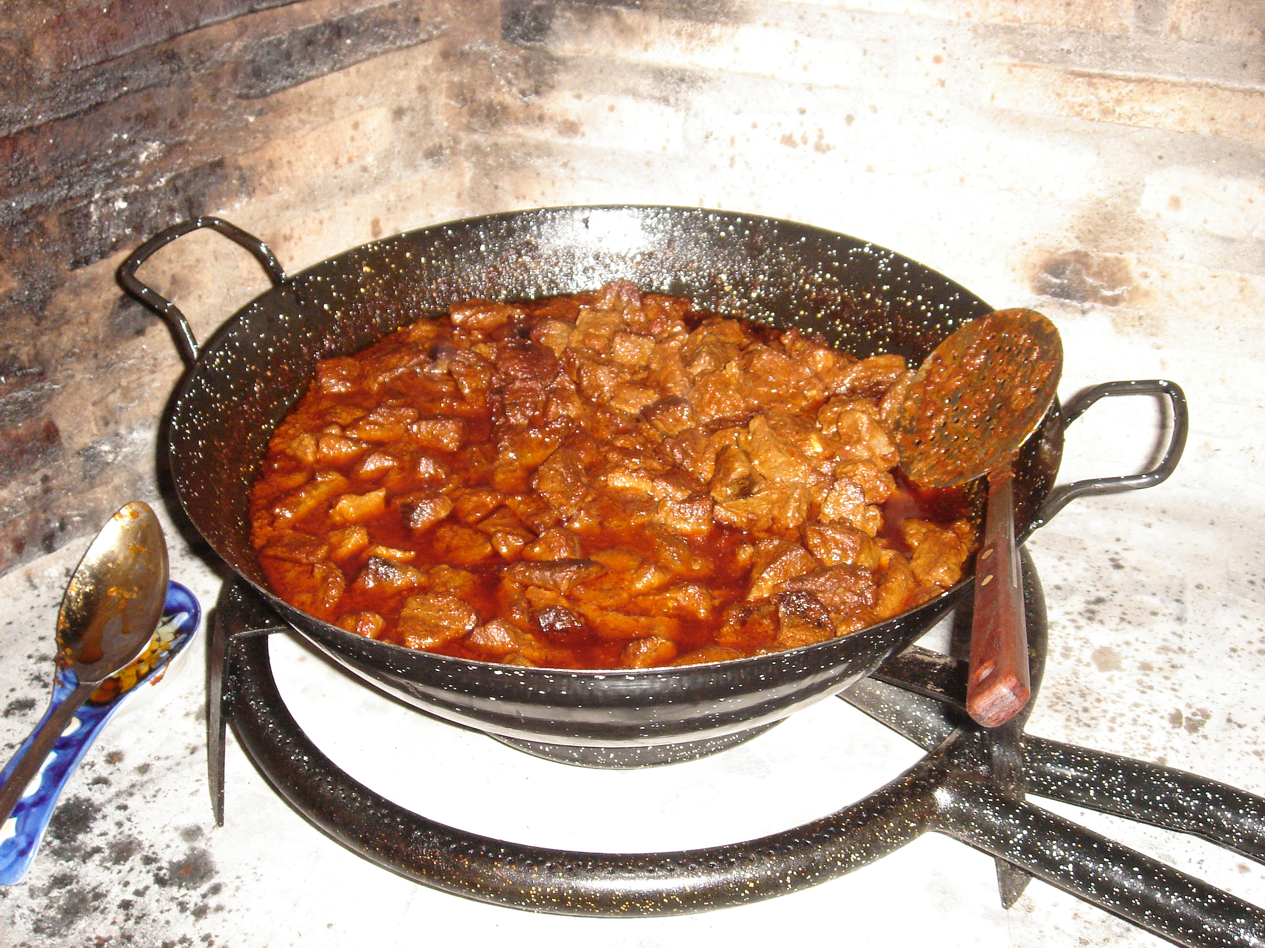 Carne al desarreglo. Preparación de la misma. Plato de Colmenar de Oreja, España.